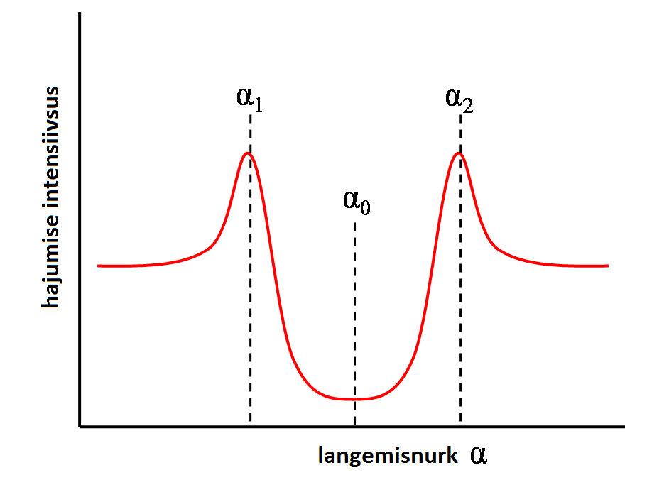 langemisnurga ja intensiivsuse sõltuvus